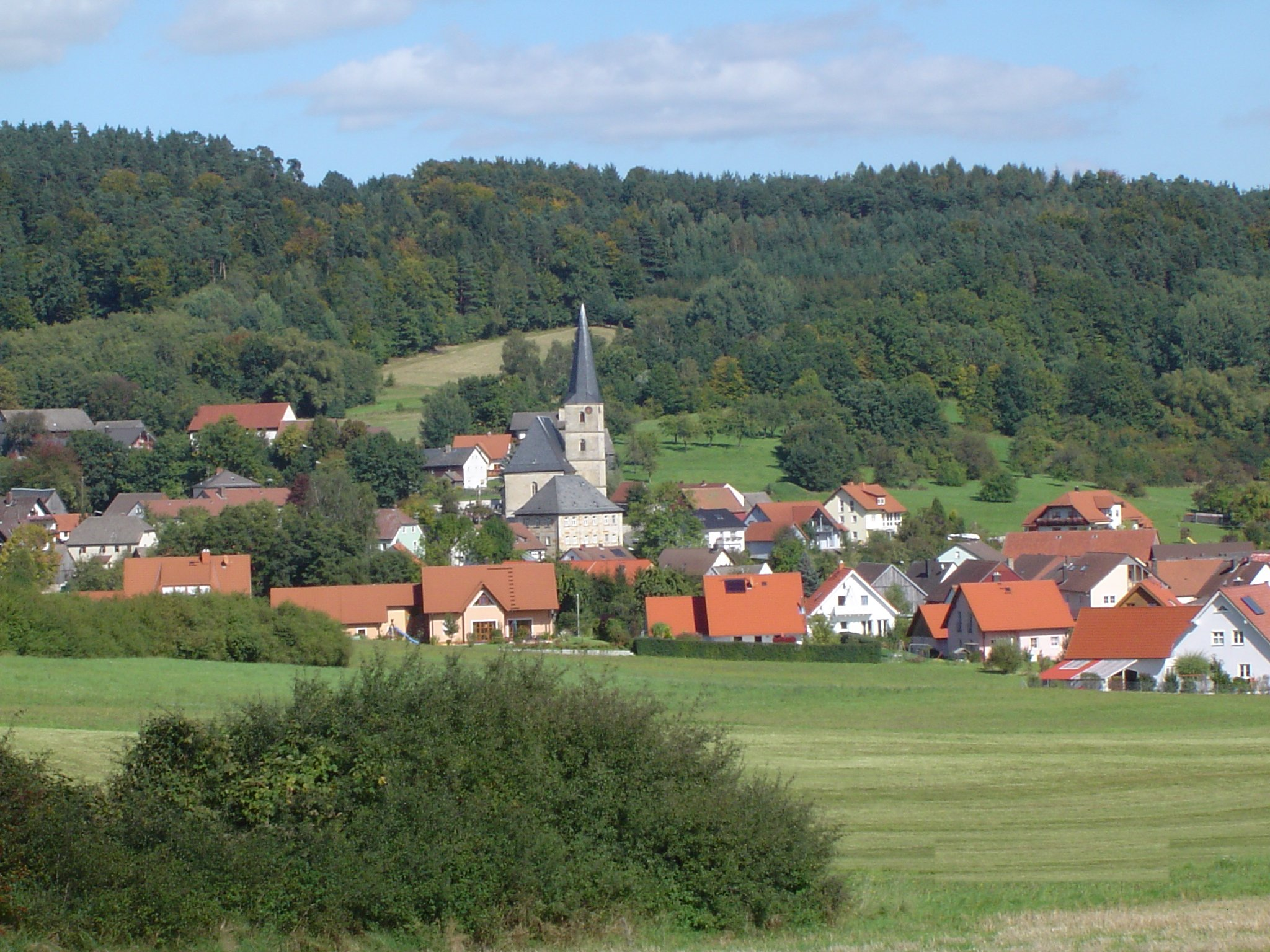 Gesamtansicht des Ortsteils Volsbach, Gemeinde Ahorntal